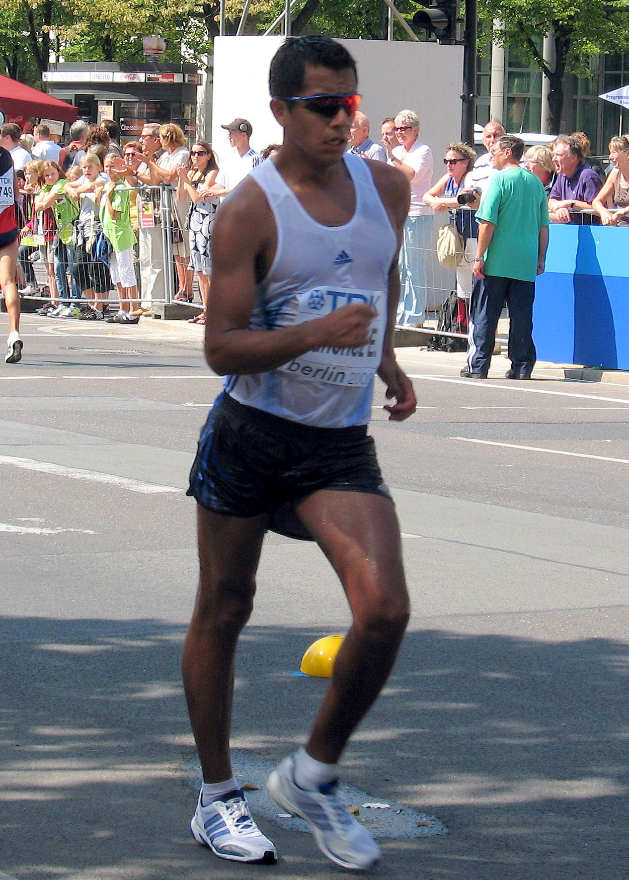 Eder Sánchez, 15.08.2009